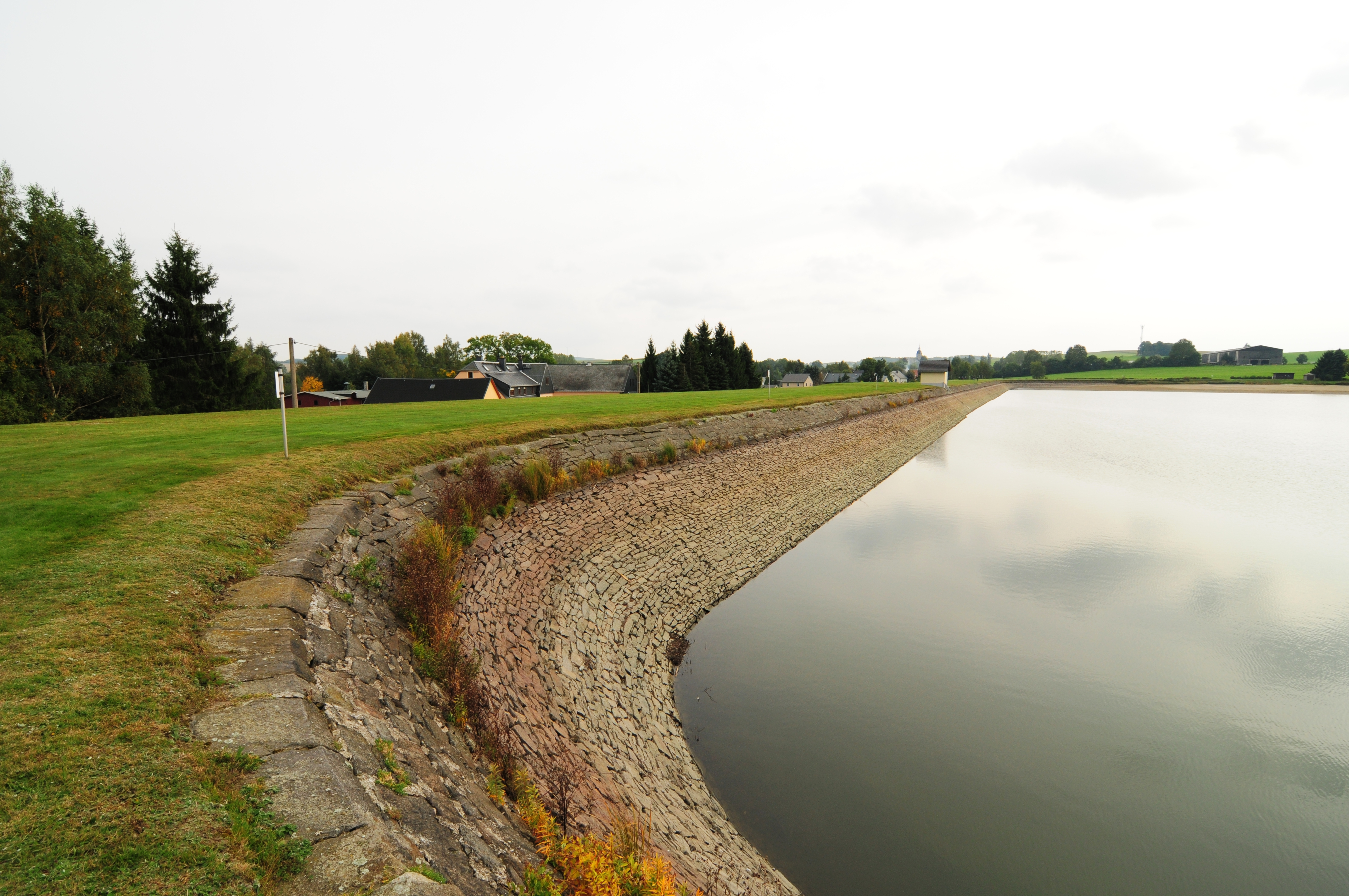 Großhartmannsdorf, Mittlerer Großhartmannsdorfer Teich (Landkreis Mittelsachsen, Sachsen, Deutschland)